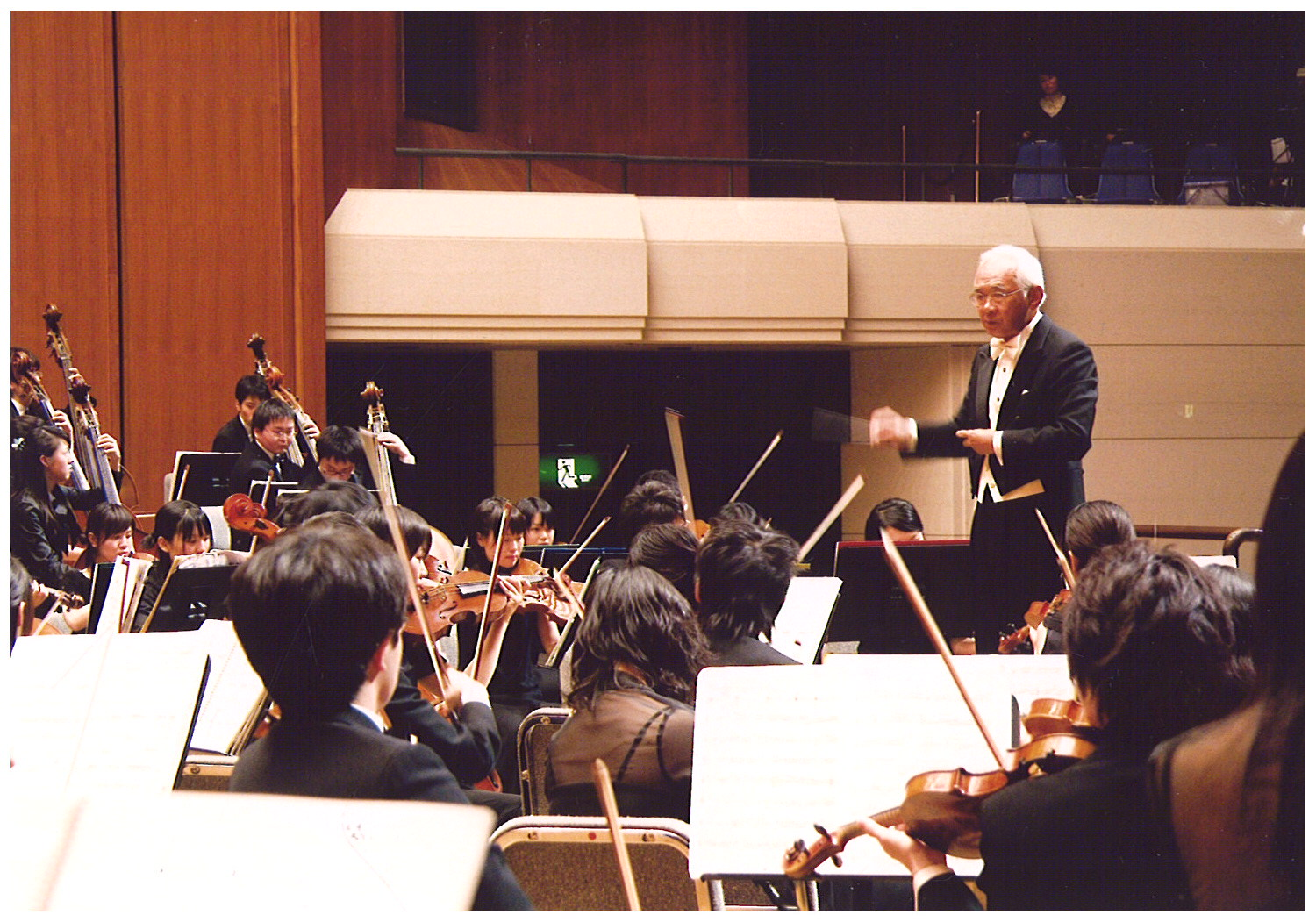 G.マーラー：交響曲第5番を指揮する保科洋 ～ 2006年12月23日岡山大学交響楽団第53回定期演奏会より （岡山シンフォニーホール）